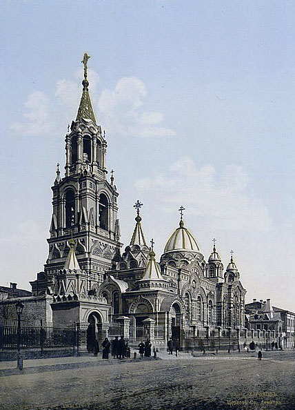 19th-century vintage postcard of St Demetrius Church in Kharkov. Дмитриевский собор в Харькове. Данный вид придан архитектором М.И. Ловцовым, 1896. Перестроен под кинотеатр "Спорт" в 1930-е годы. Вид со стороны ул. Екатеринославской (ныне Полтавский шлях).